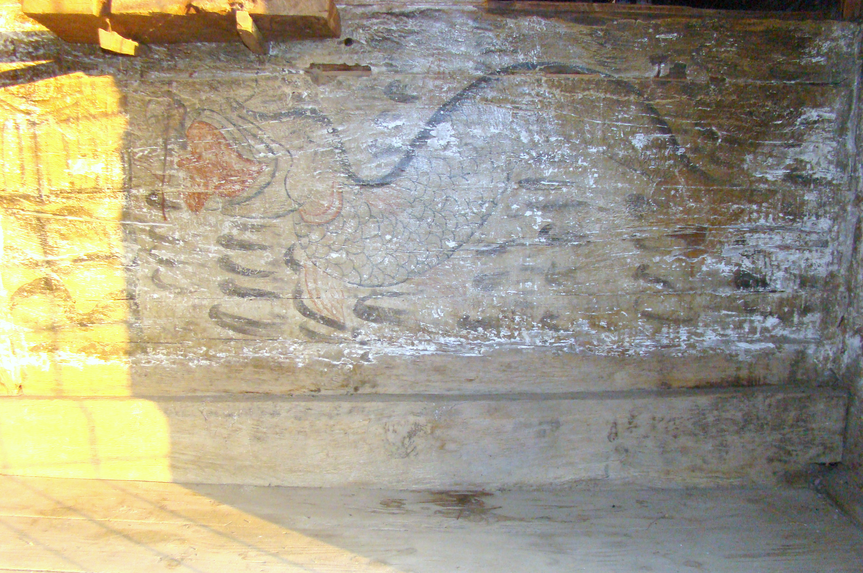 Biserica de lemn "Sfinții Arhangheli Mihail şi Gavriil" din Chieșd, județul Sălaj